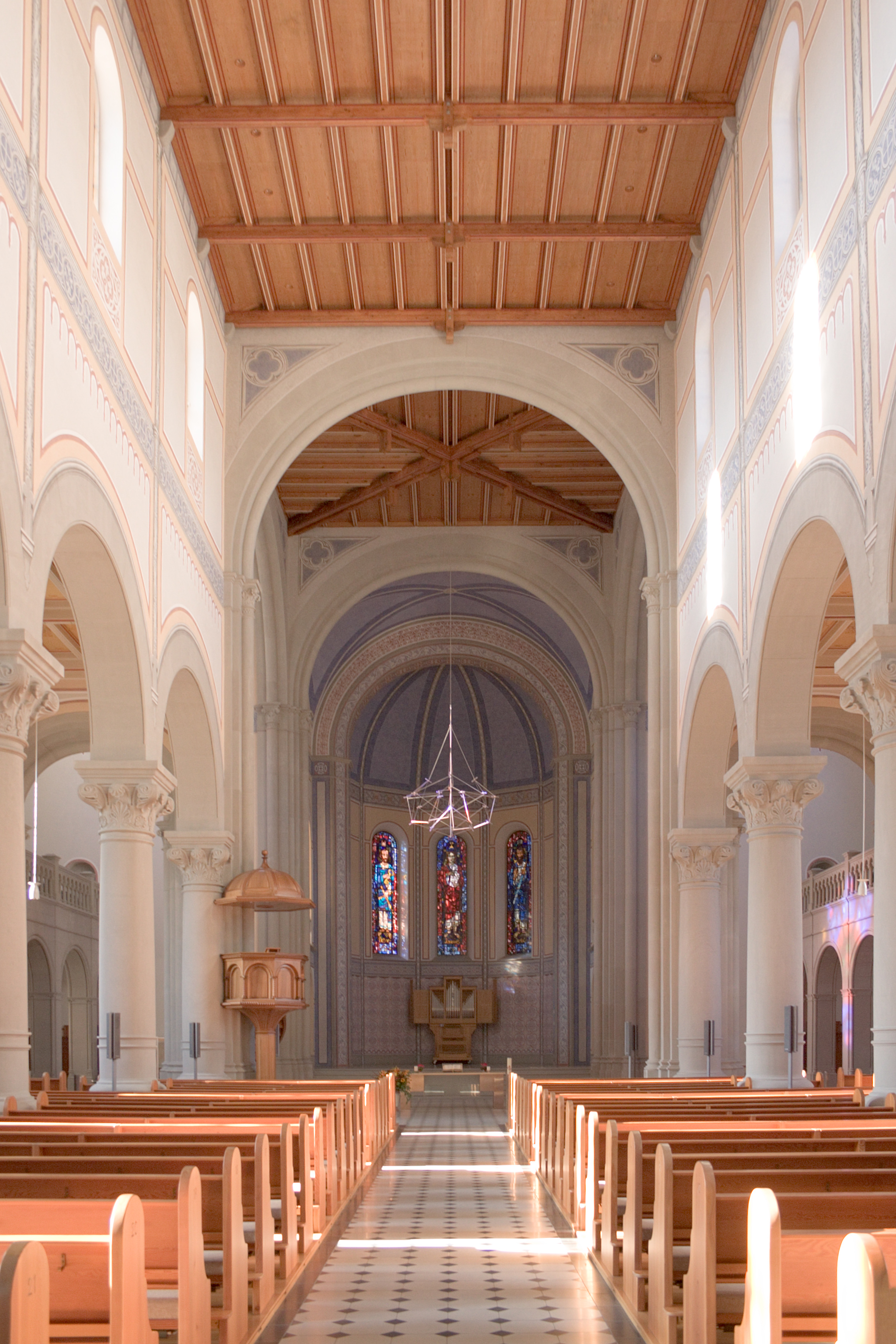 Schiff und Chor der Stadtkirche Glarus, Schweiz